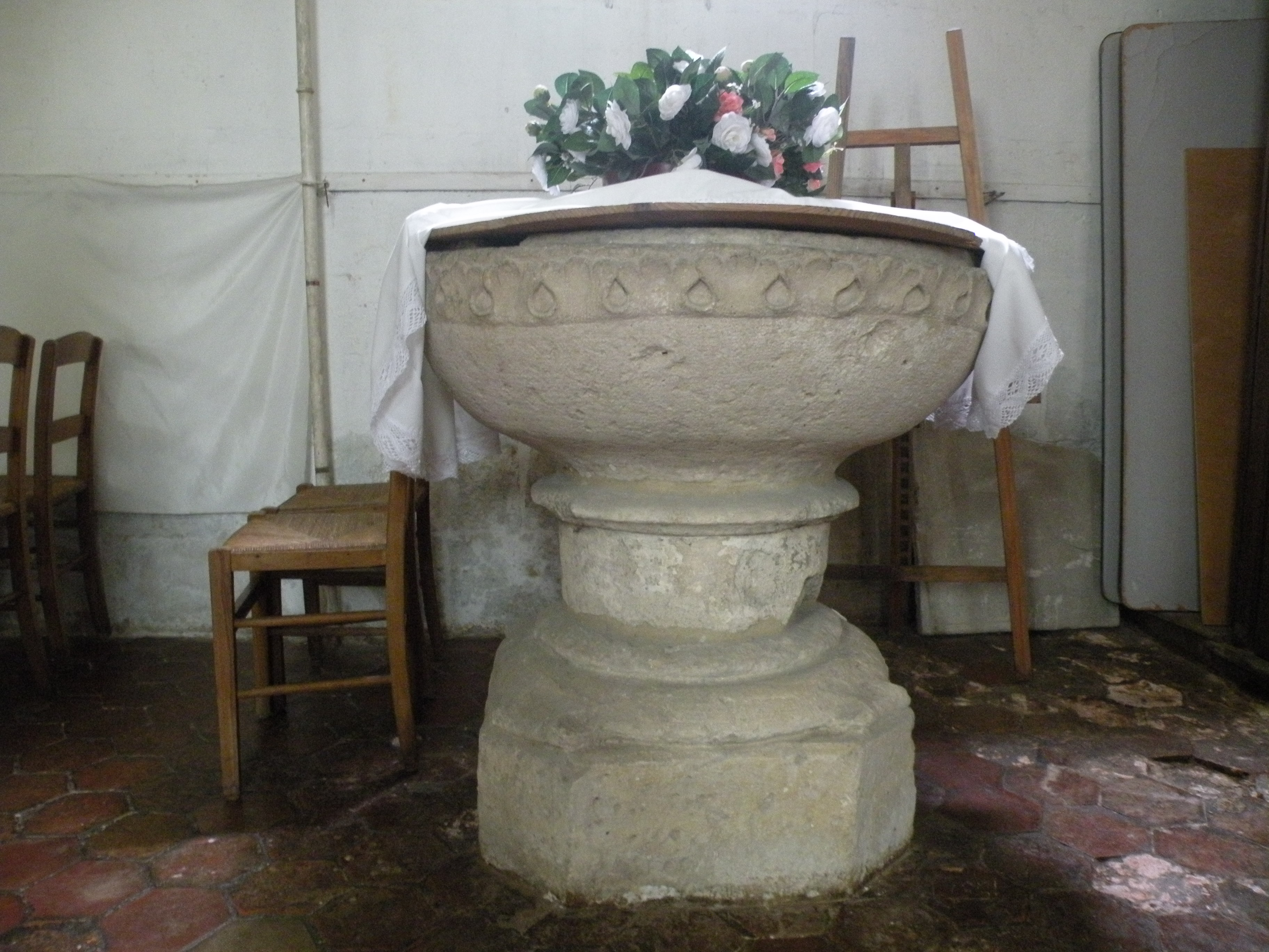 Fonts baptismaux de l'église Saint-Martin de Vallangoujard